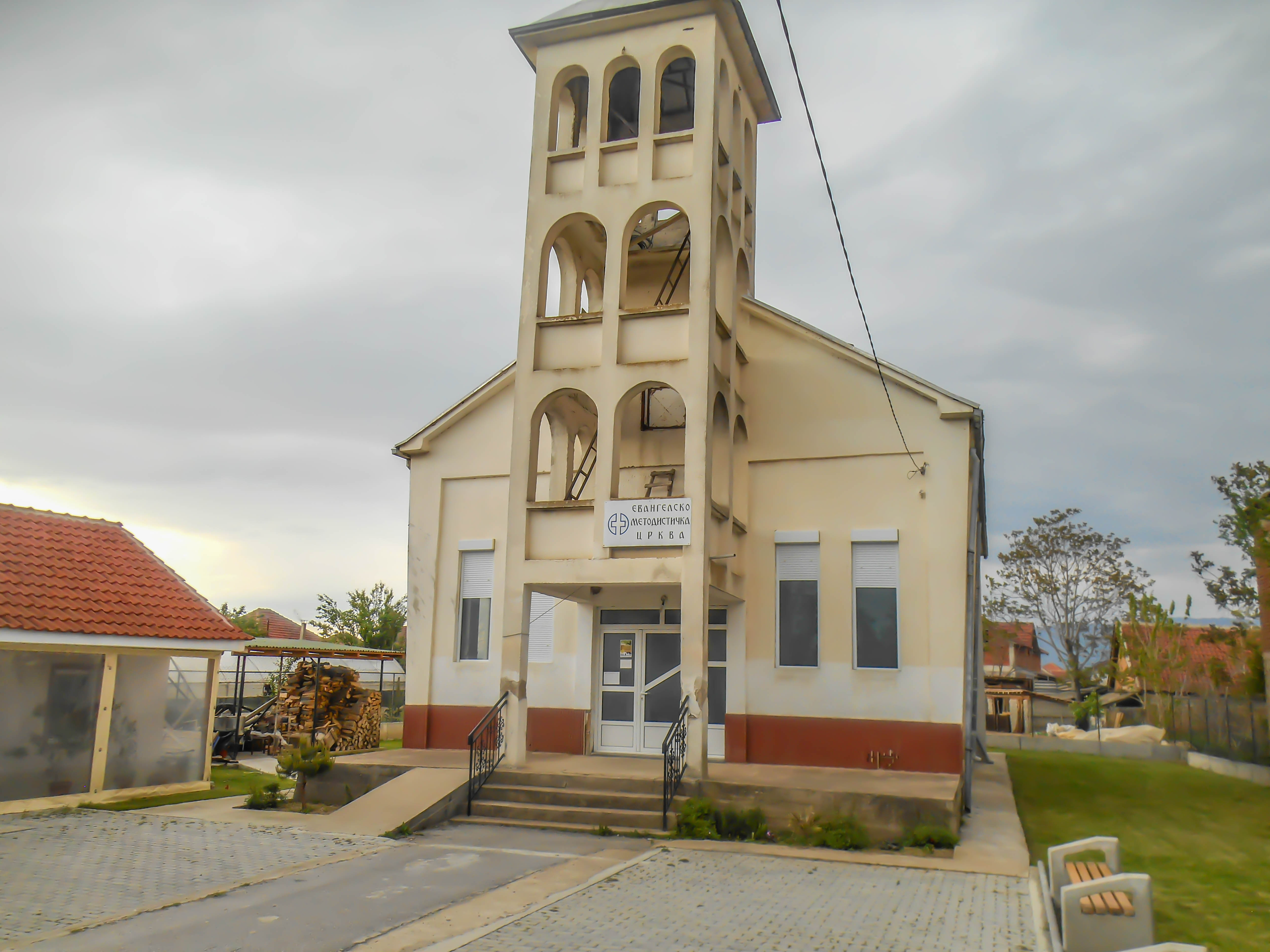 Евангелско-методистичка црква - Моноспитово